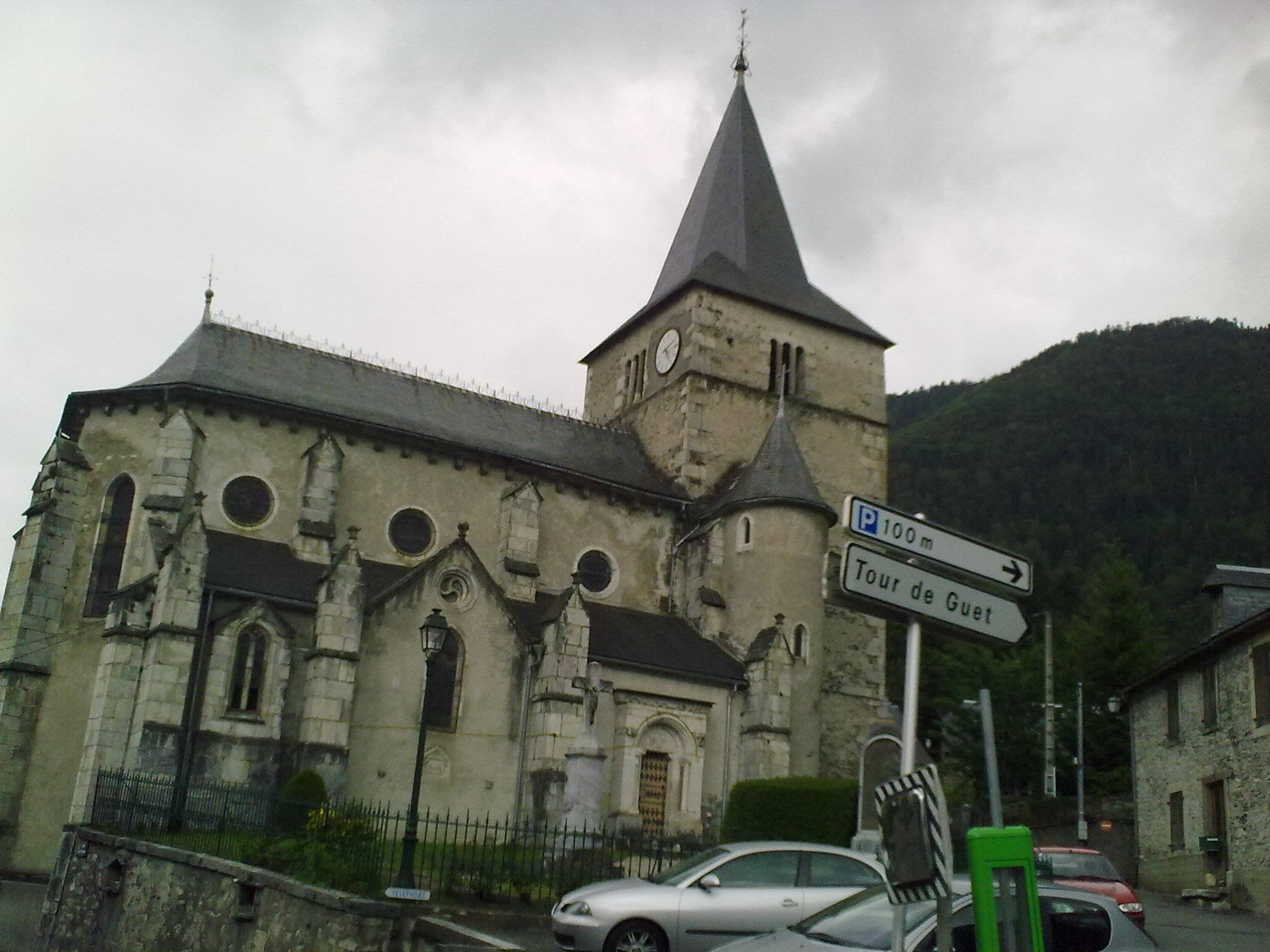 Cadéac